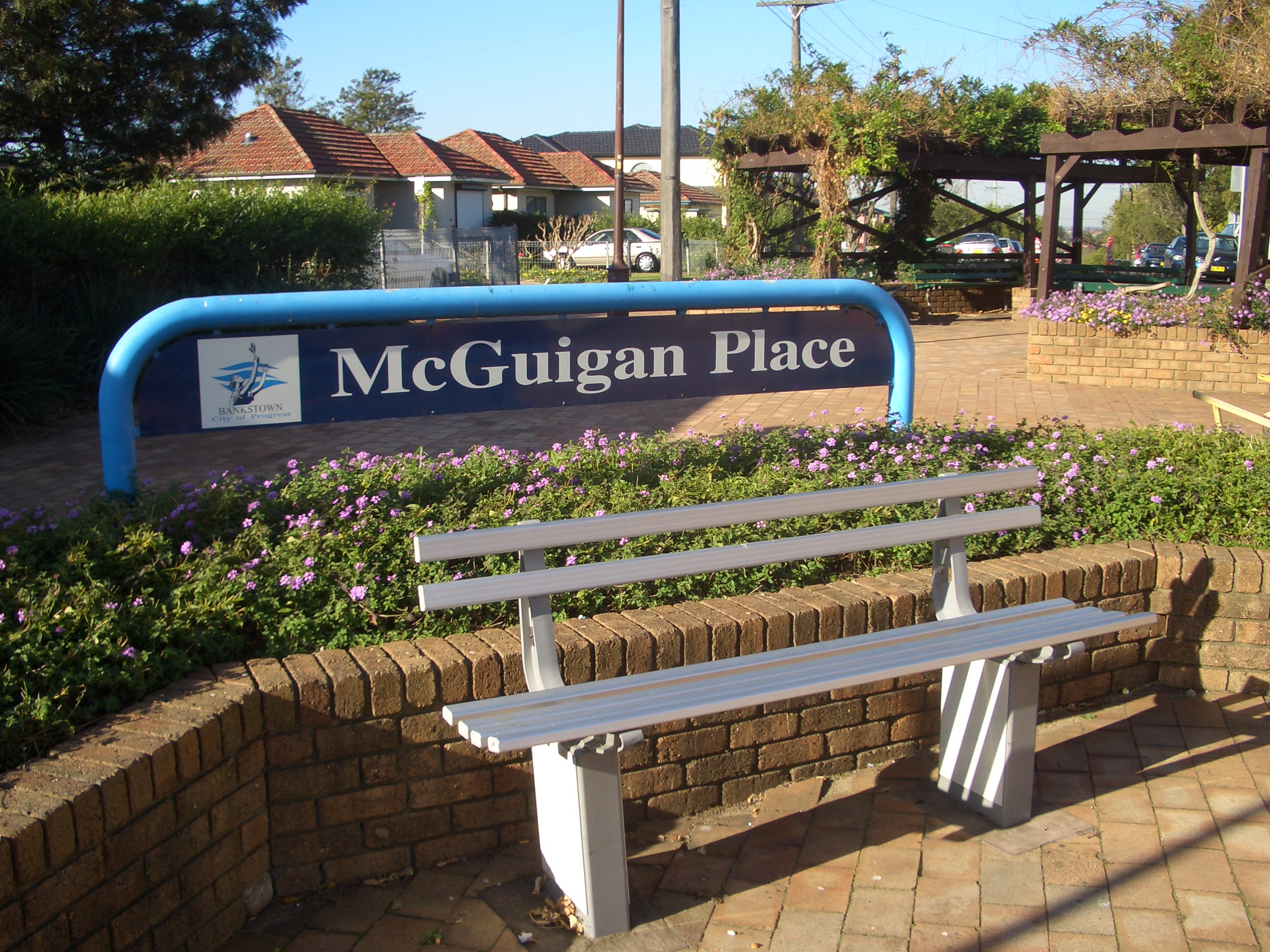 Greenacre_McGuigan_Place